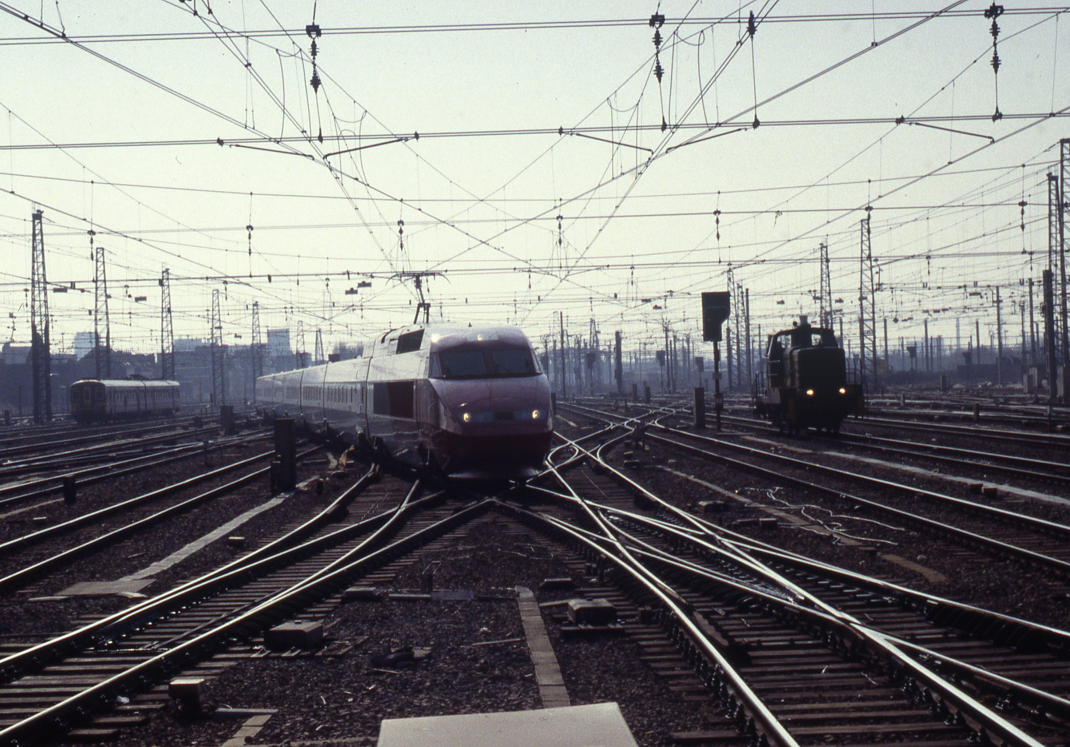 Een Thalys over de wisselstraat in Brussel Zuid in 1996